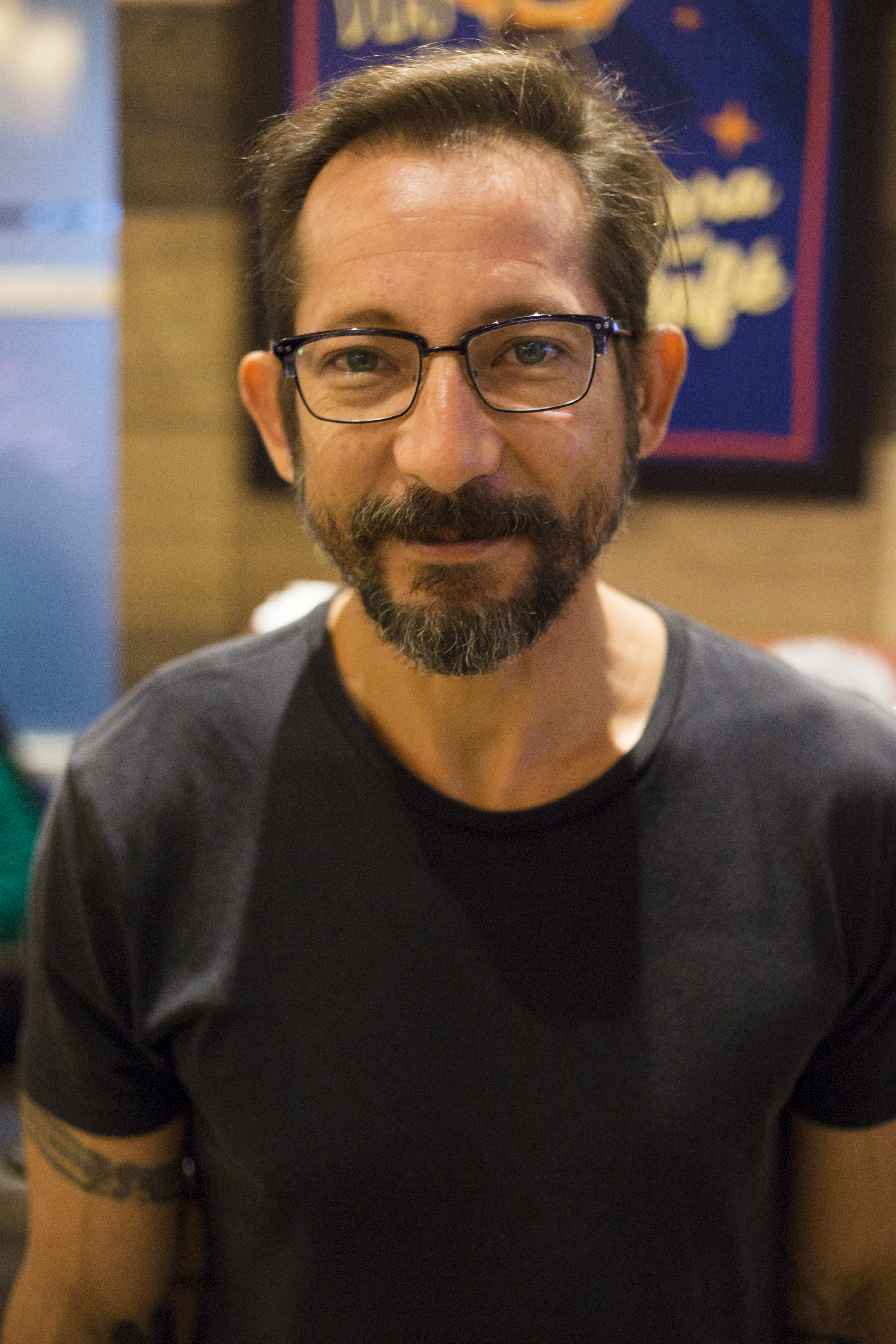 Alejandro Fajardo, actor de cine ecuatoriano.